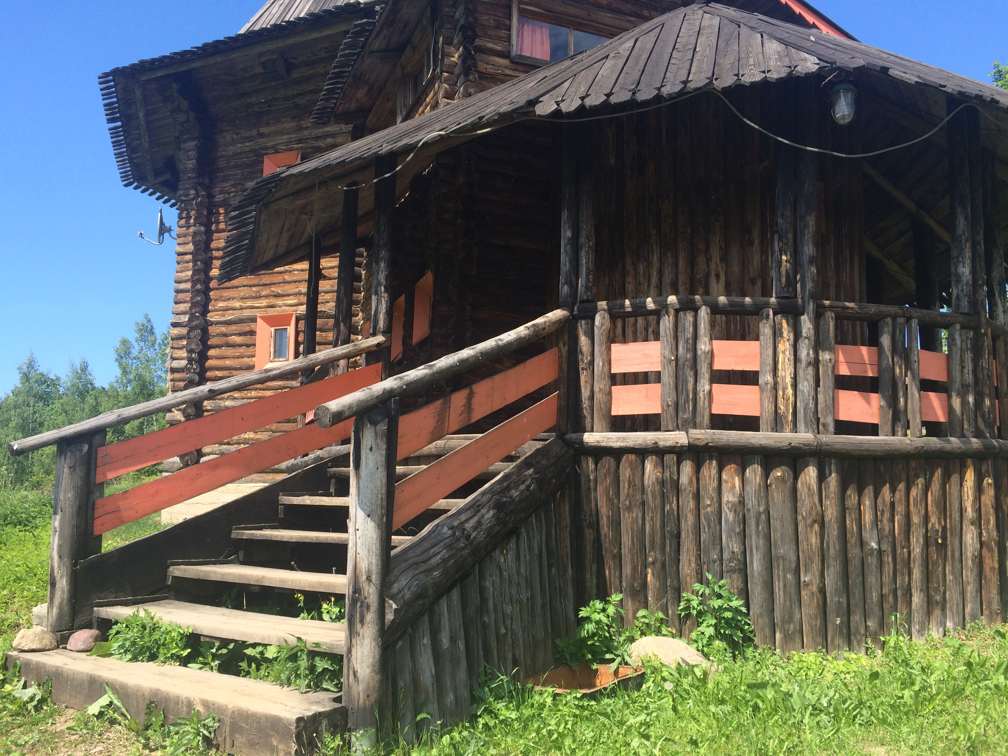 крыльцо со стороны родника